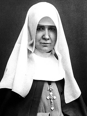 Bild von Helena Maria Stollenwerk